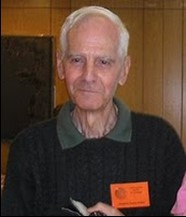 imagen de Demetrio Santos